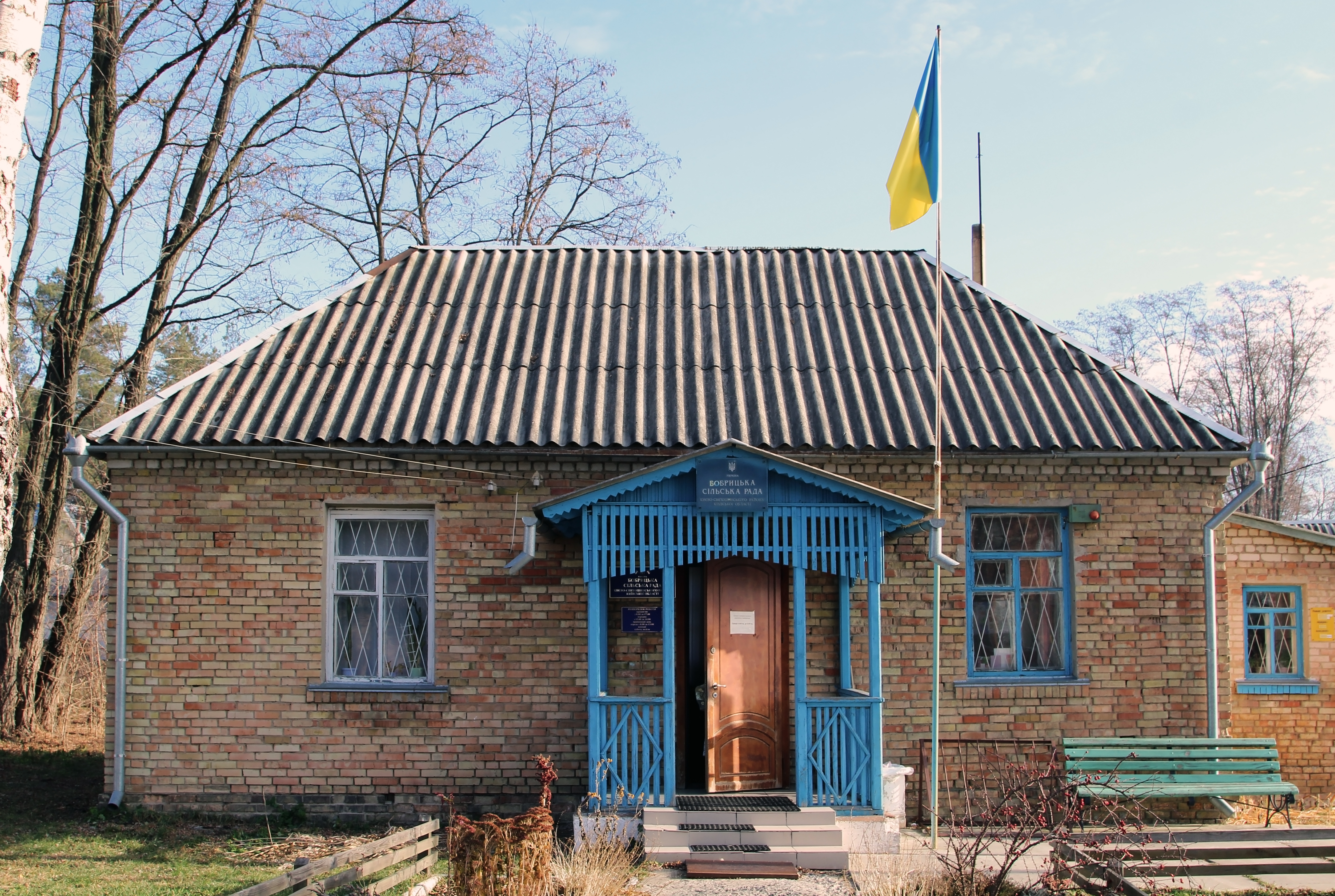 Бобрицька сільська рада, Бобриця (Києво-Святошинський район).